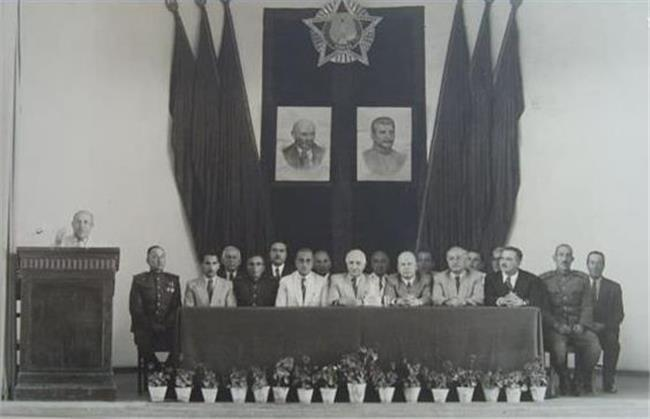 تصویر دسته جمعی پیشه وری و اعضای فرقه دمکرات. در بالای سر جمعیت دو تابلوی بزرگ از لنین و استالین، رهبران پیشین شوروی، به چشم می خورد.